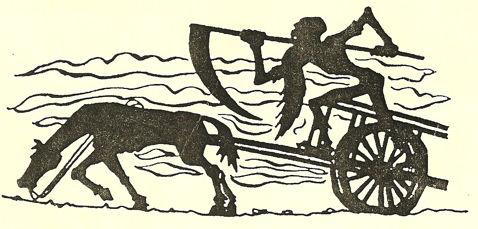 Dessin représentant l'Ankou